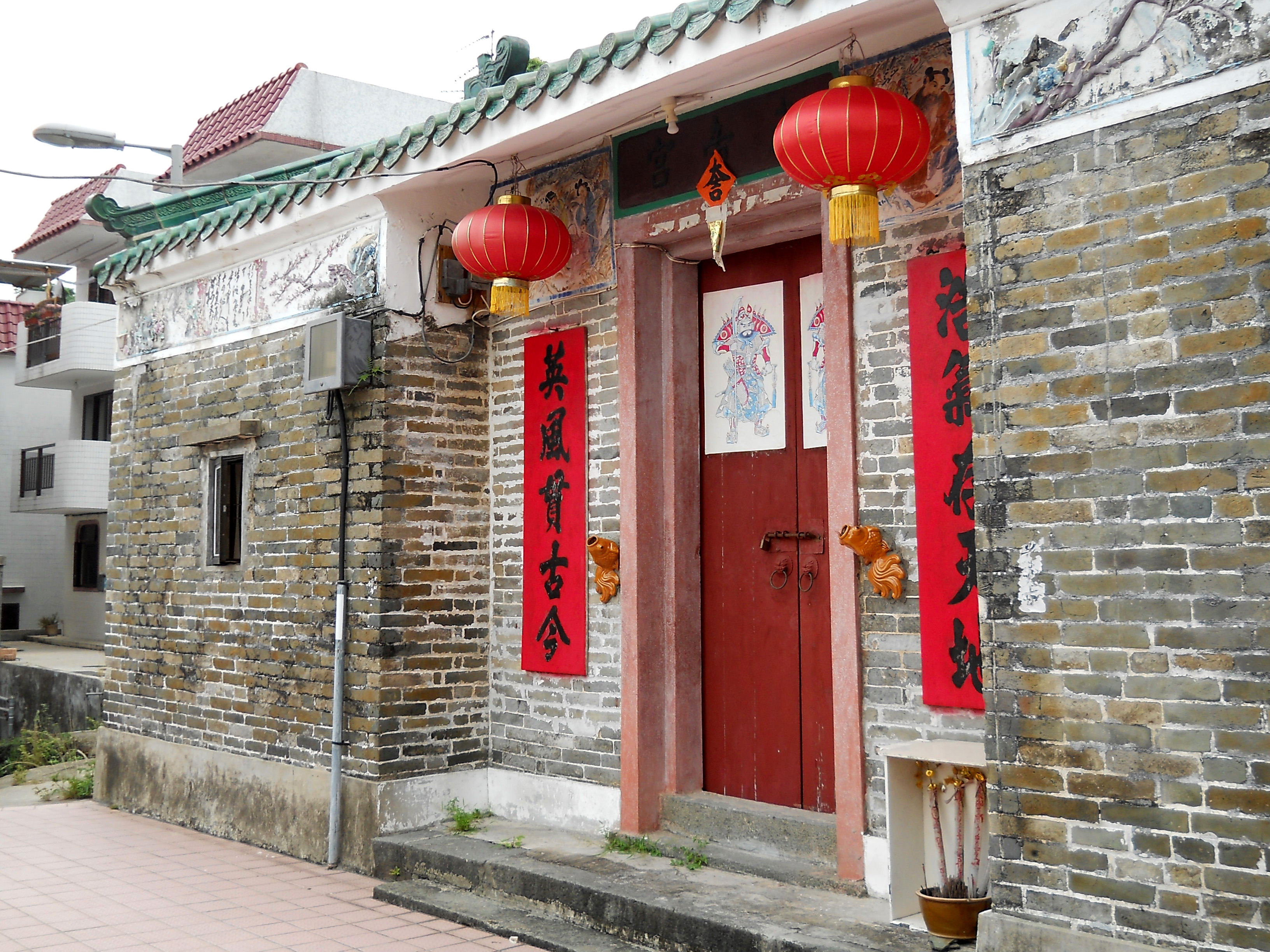 中文（香港）: 汀角武帝宮